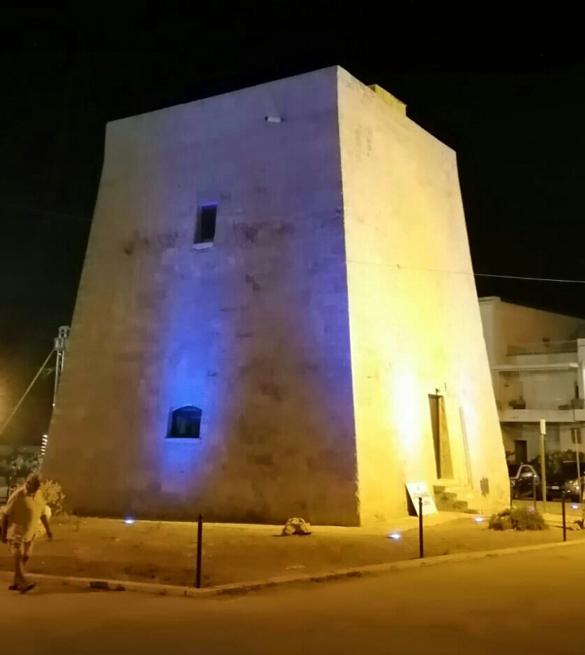 Torre costiera di Campomarino, di sera.